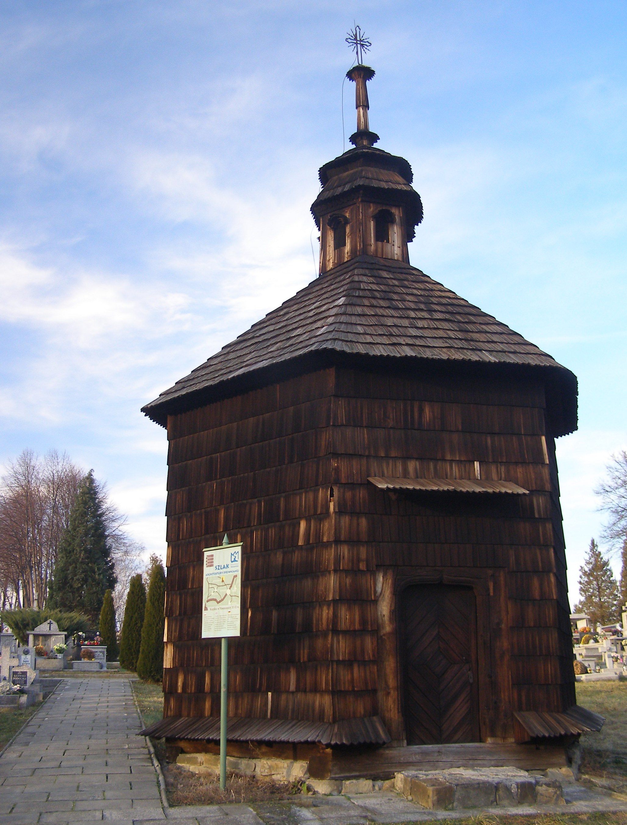 Moszczenica, kościół par. p.w. Matki Boskiej Szkaplerznej, pocz. XIX